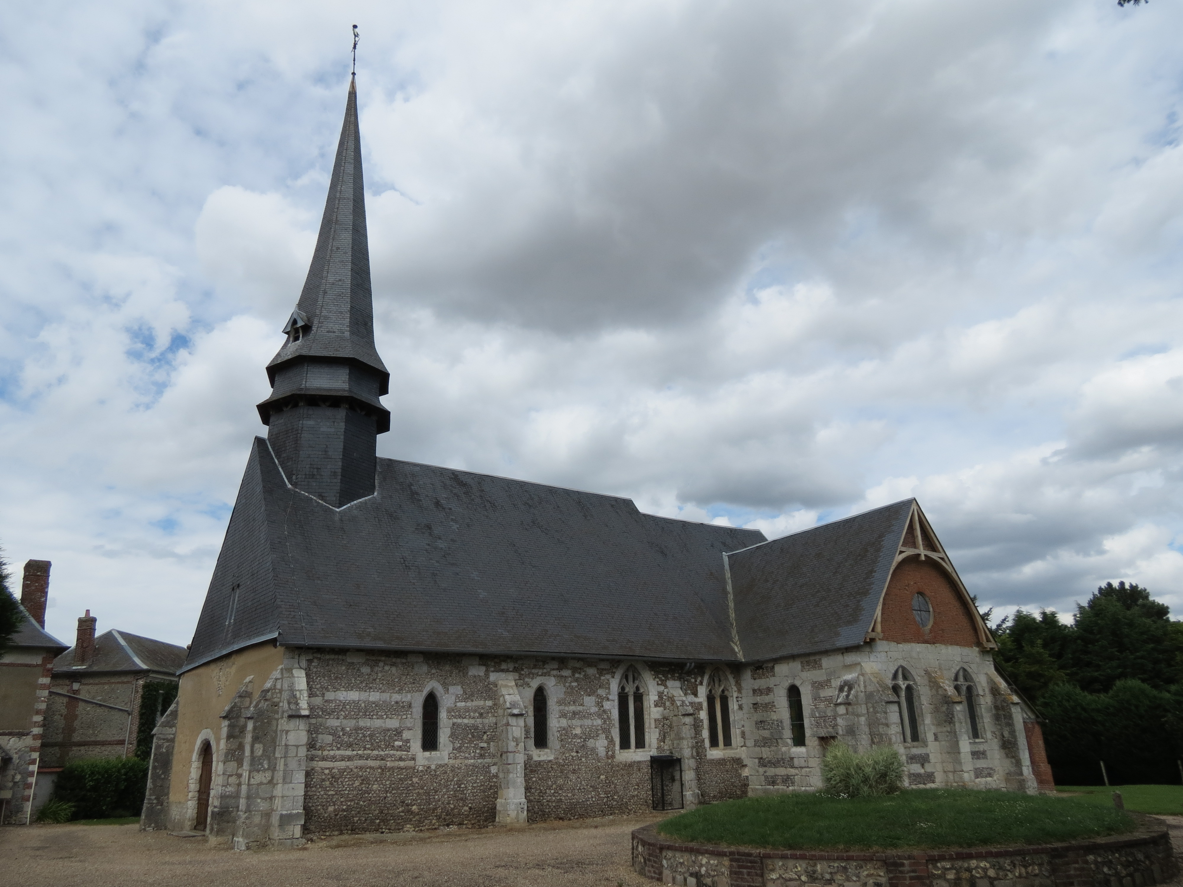 Eglise Notre-Dame.